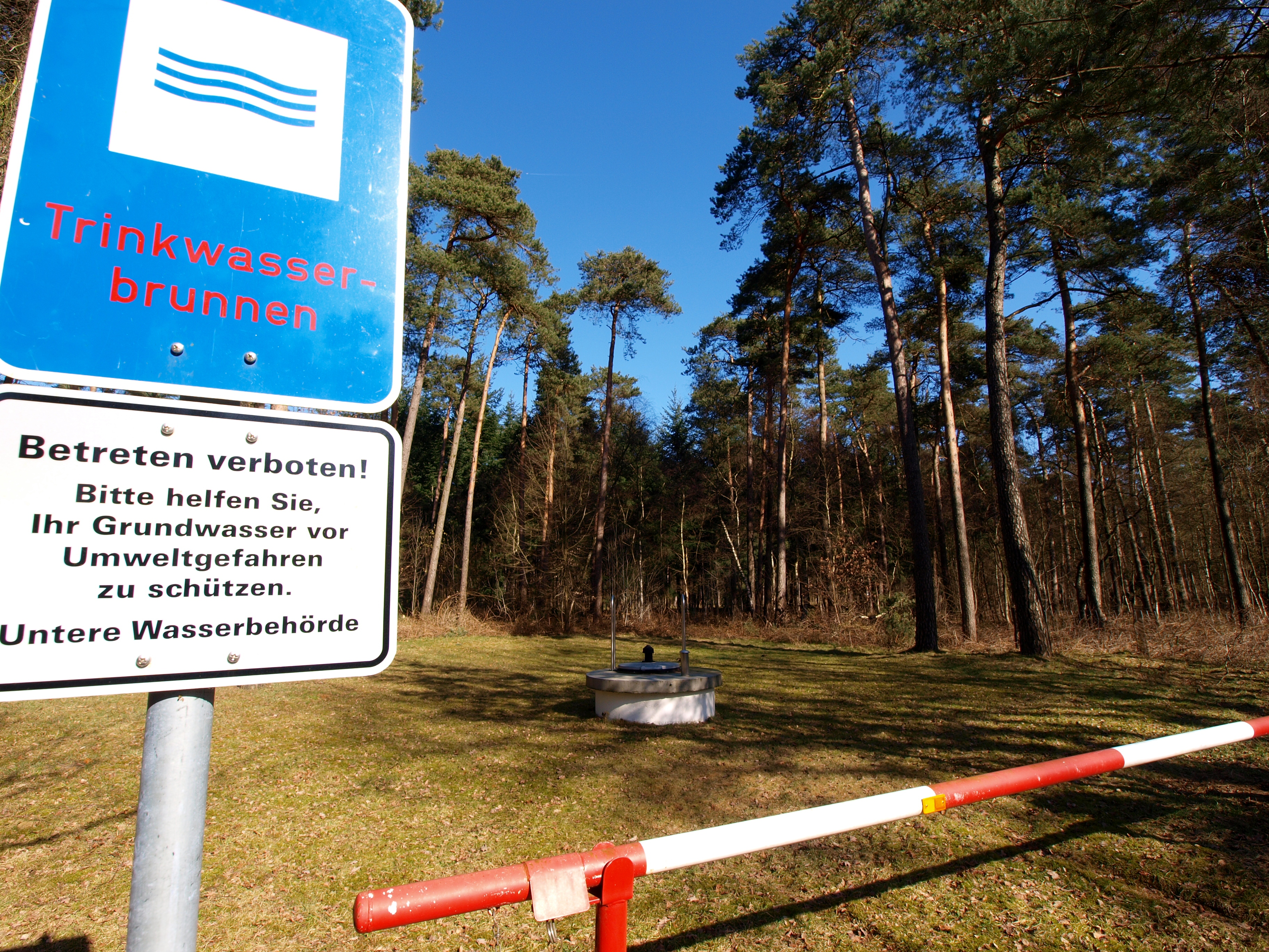 Trinkwasserbrunnen in der Hohen Ward